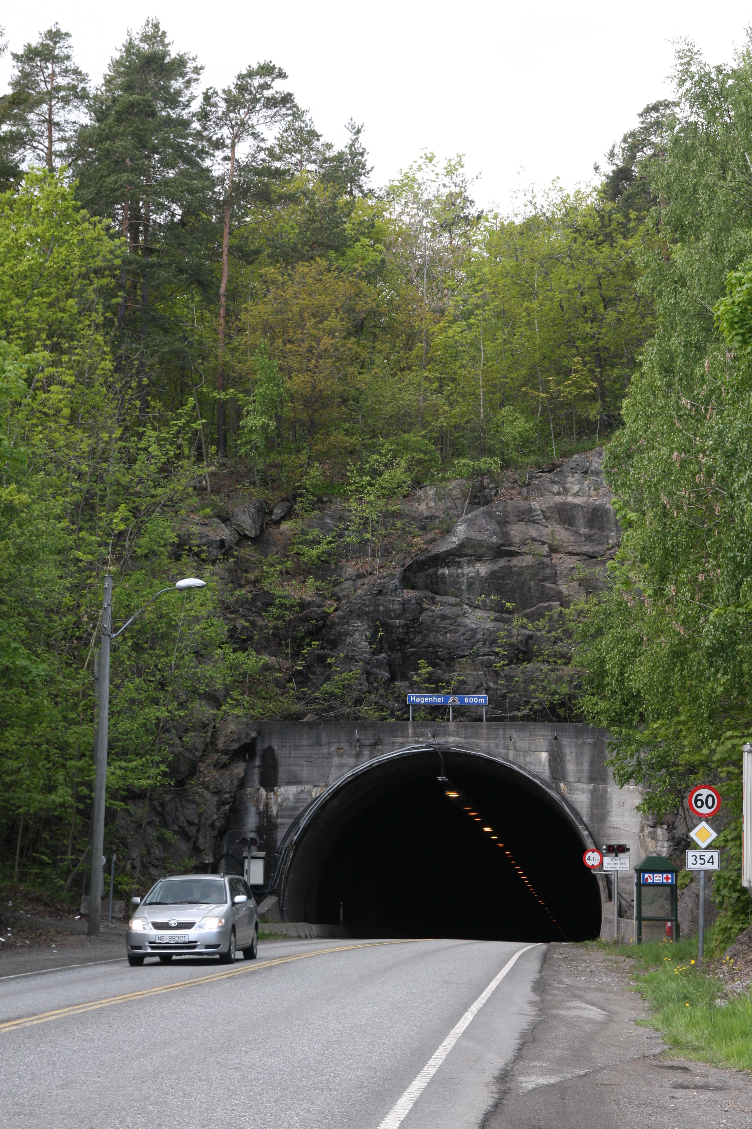 Høgenheitunnelen